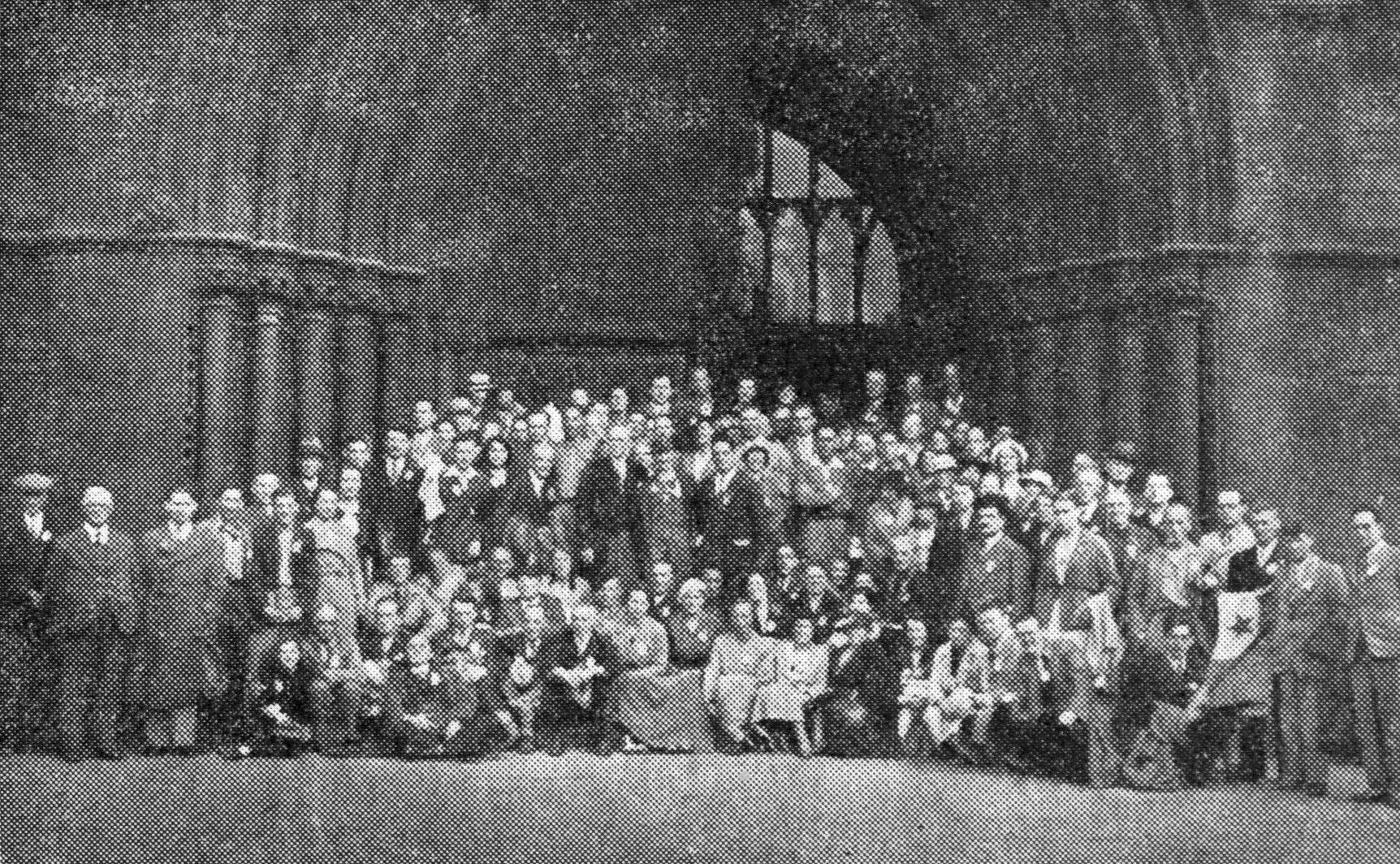 SAT-Kongreso 1936. Komuna foto antaŭ la urbodomo de Manĉestro